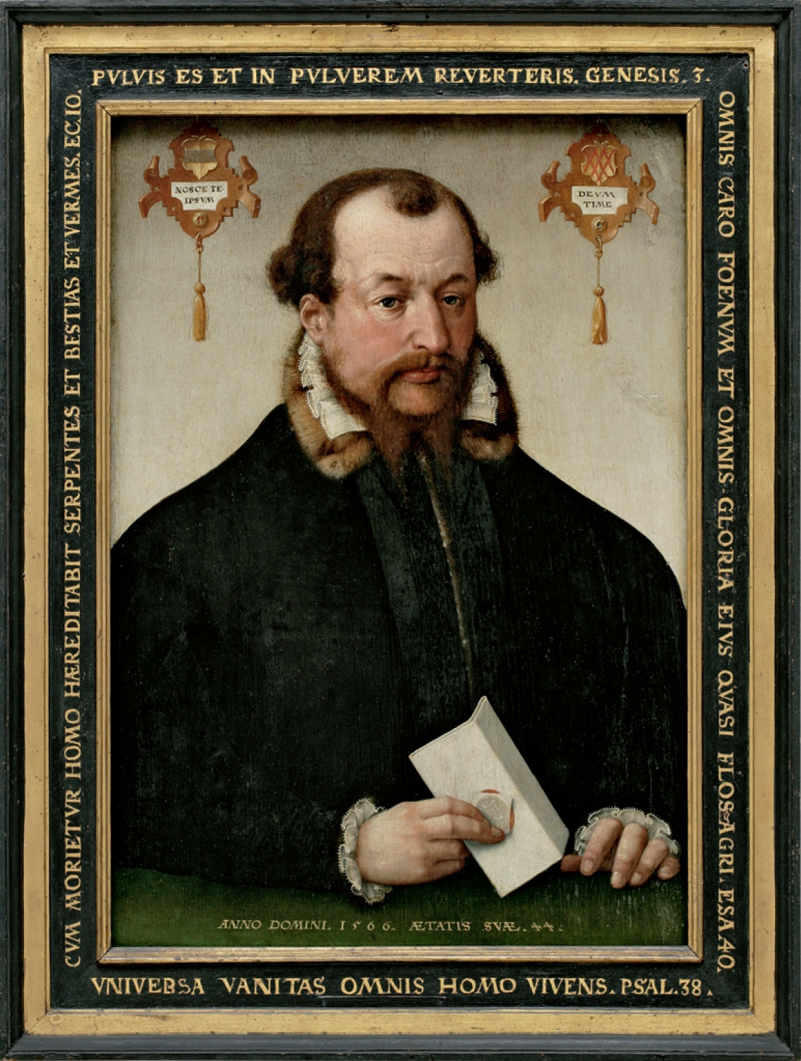 Bildnis des Goddert von Raesfeld